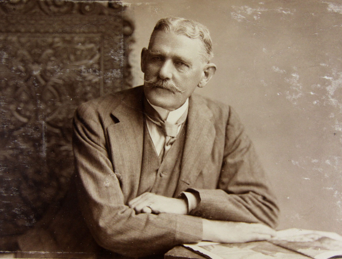 Неизвестный фотограф конца XIX века.Портрет Вордсворта Донисторпа